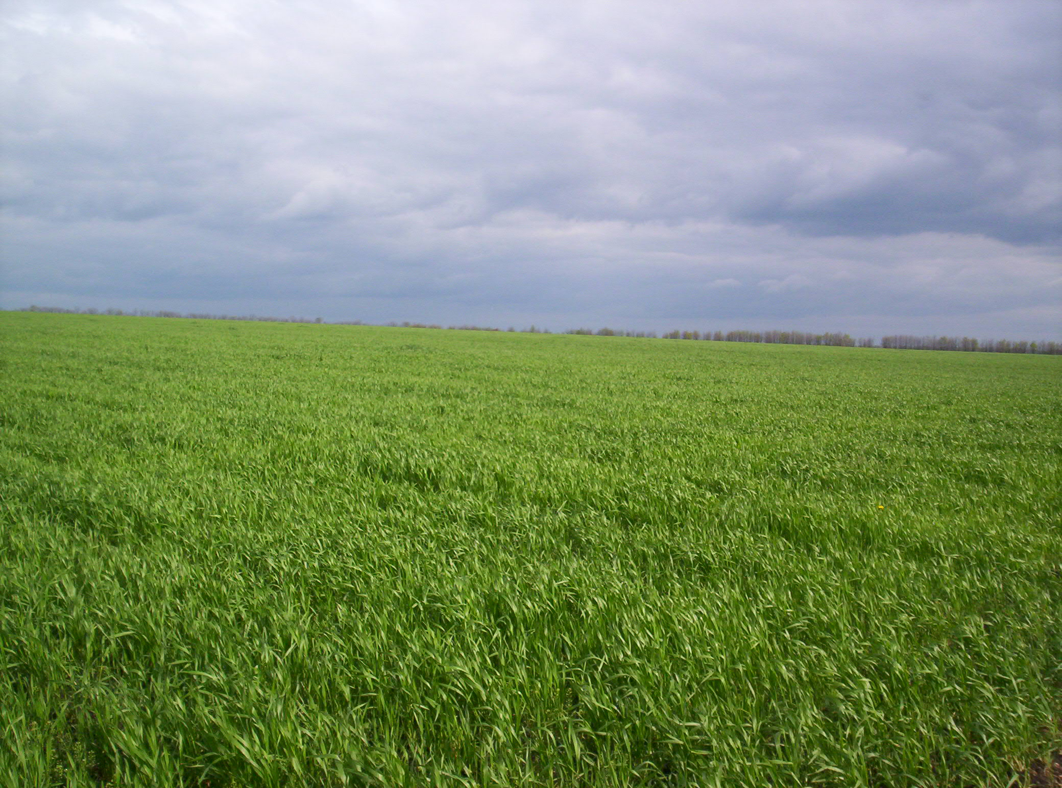 Пшеничне поле в Єланецькому районі неподалік села Півні